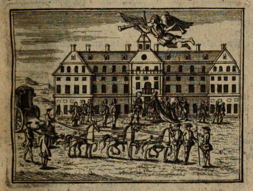 Illustration aus: Des Neu eröffneten Historischen Bilder=Saals vierzehender Teil / Erster Periodus von den merkwürdigen Geschichten die sich vom Anfang des Jahrs 1761 bis zu dem Hubertusburger Frieden 1763 unter der glorreichen Regierung Kaisers Franz des Ersten zugetragen haben, Zweyter Periodus, I. Capitel, S. 435: "1762 Hubertusburg wird zur Friedenshandlung gewählet."